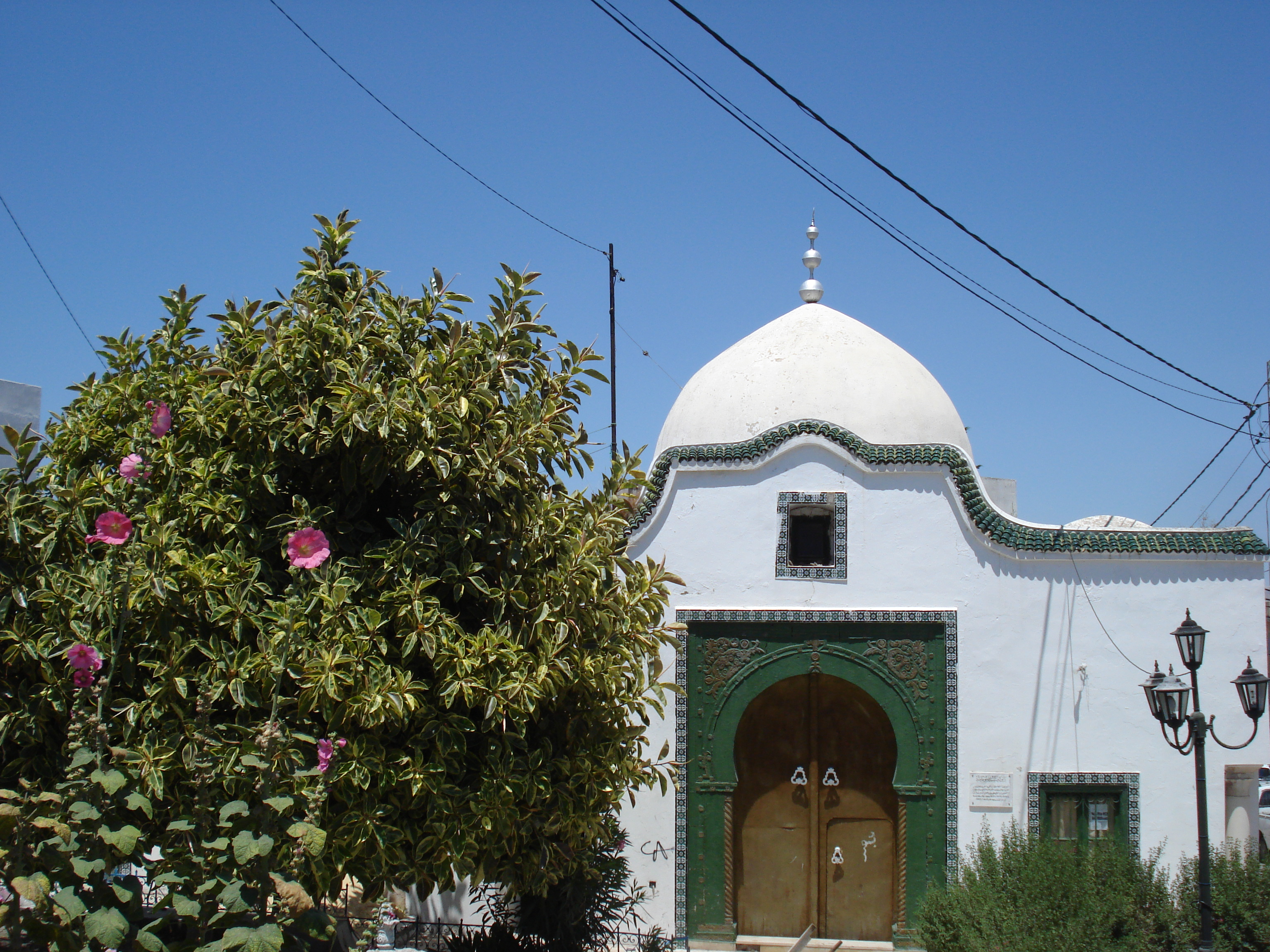 Mausolée Sidi Bouteffaha, Béja, Tunisie